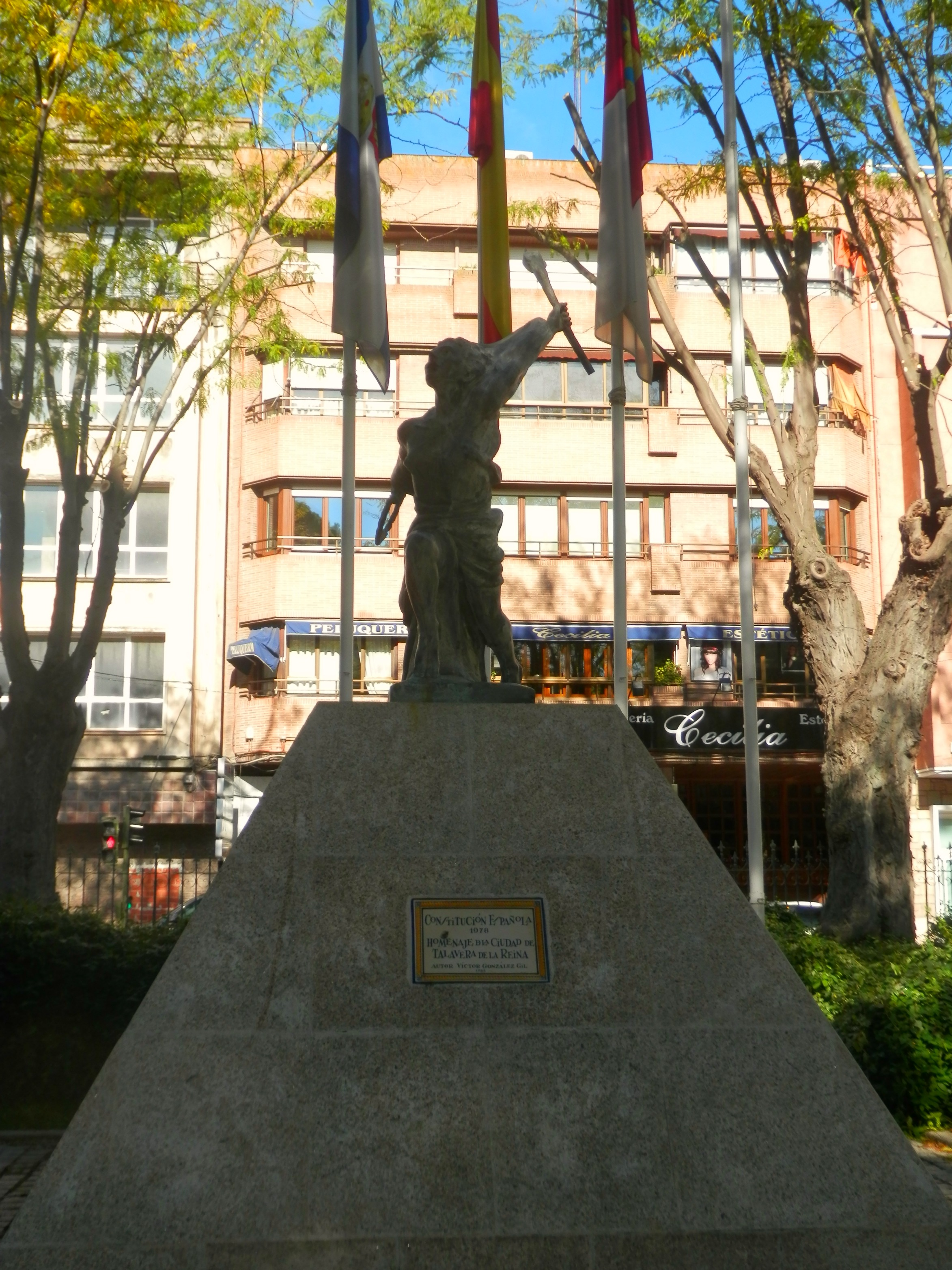 Monumento a la Constitución.